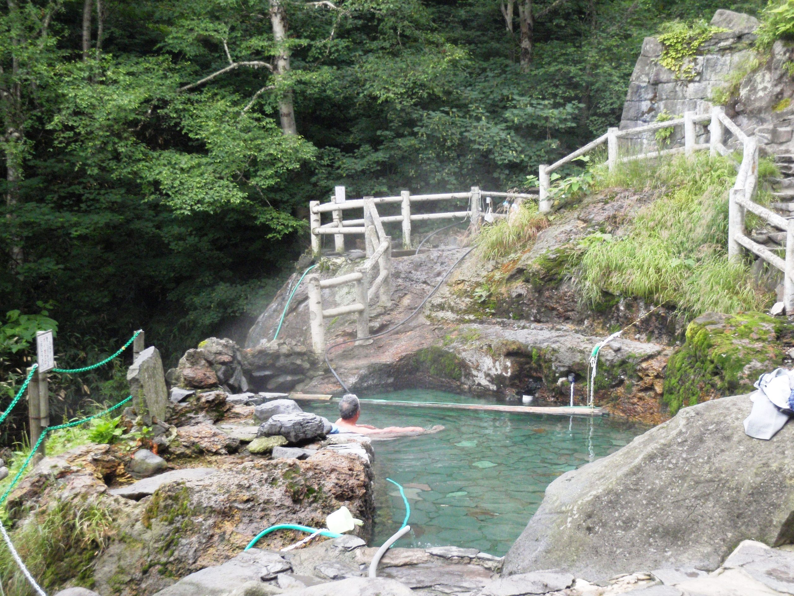 吹上温泉吹上の湯